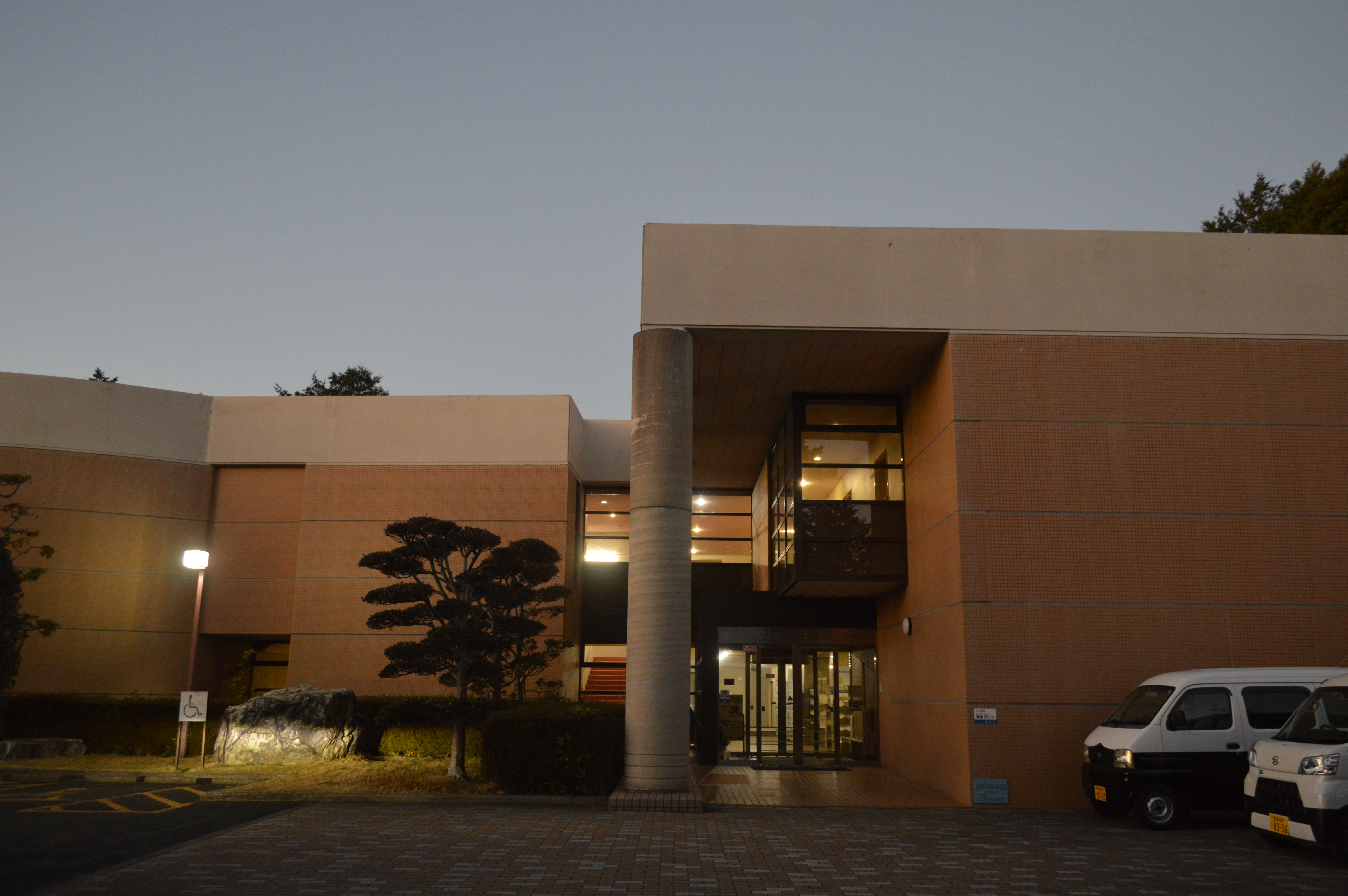 愛知県豊川市の豊川市一宮生涯学習会館。